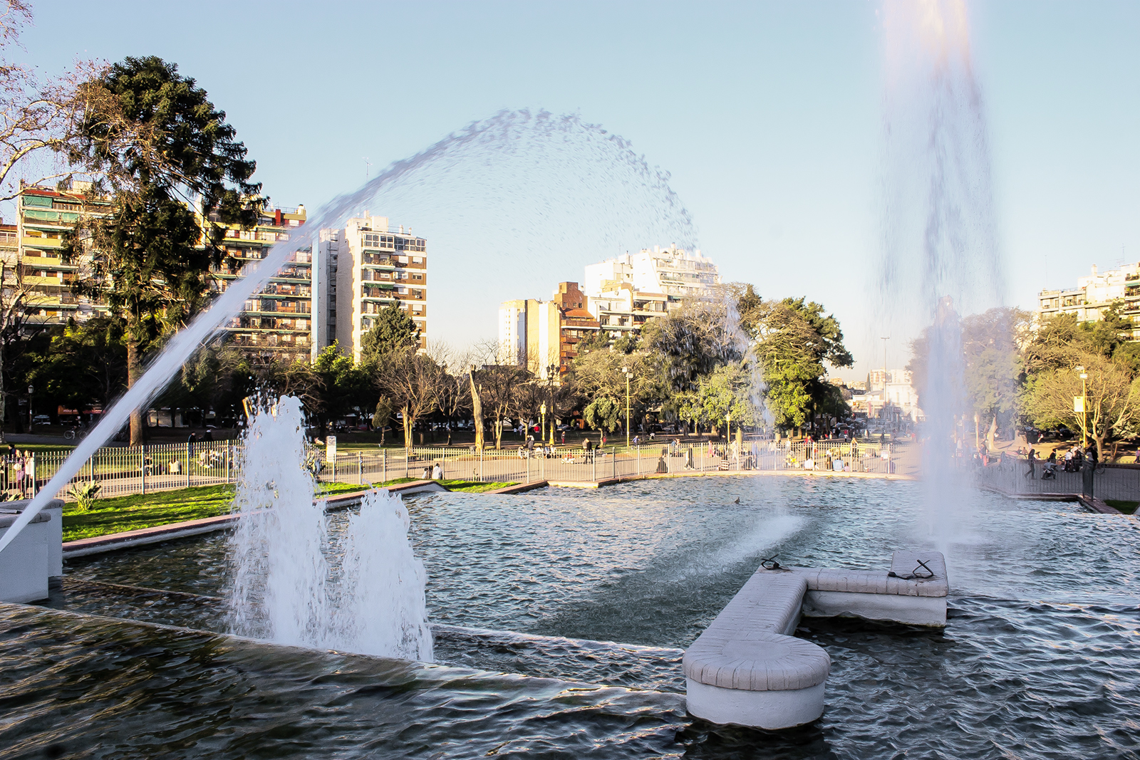 Fuente del Parque Chacabuco, Ciudad Autónoma de Buenos Aires. República Argentina.